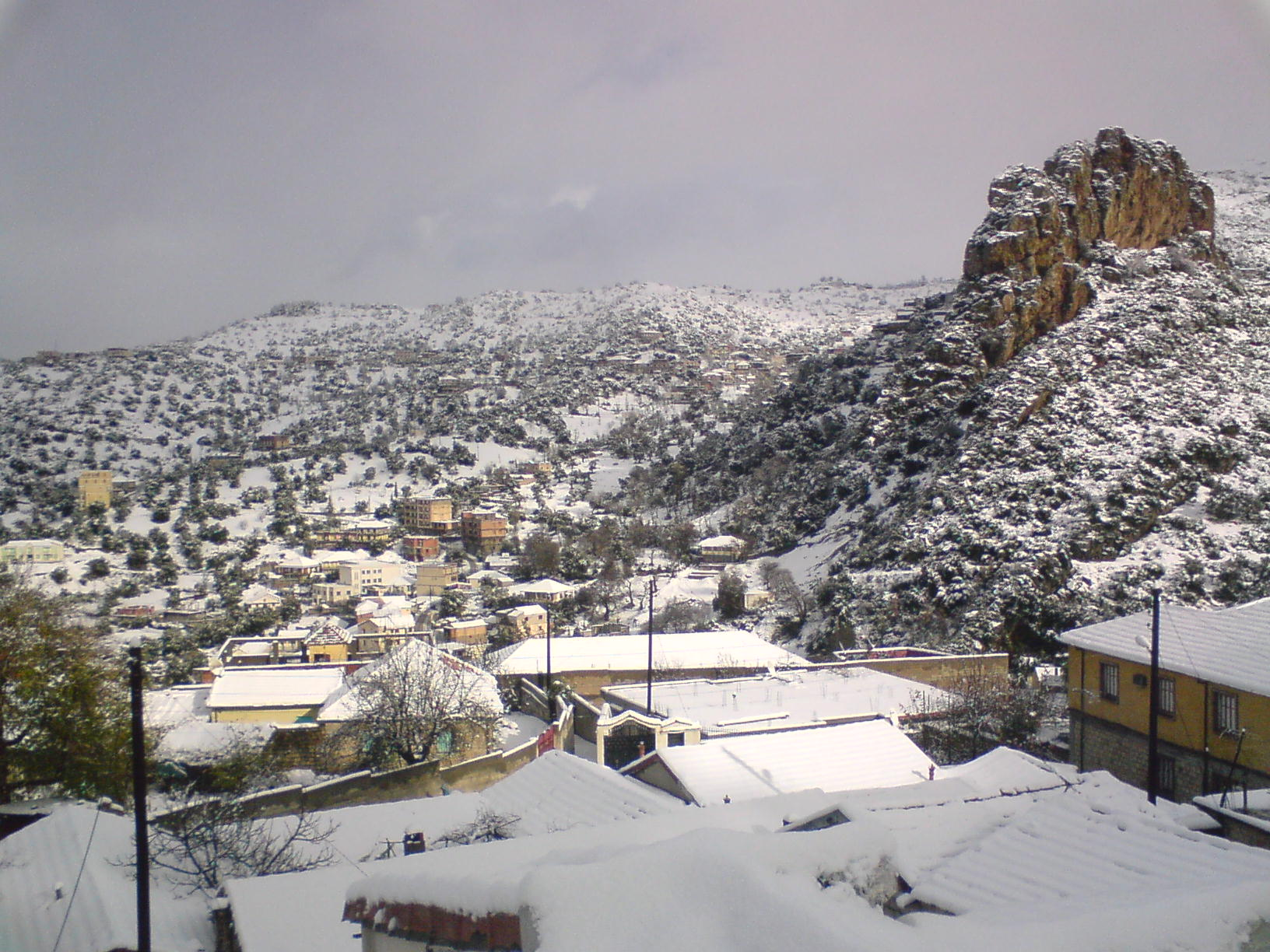 Village d'Assif El Hammam à la wilaya de Béjaïa (Adekar, Algérie).